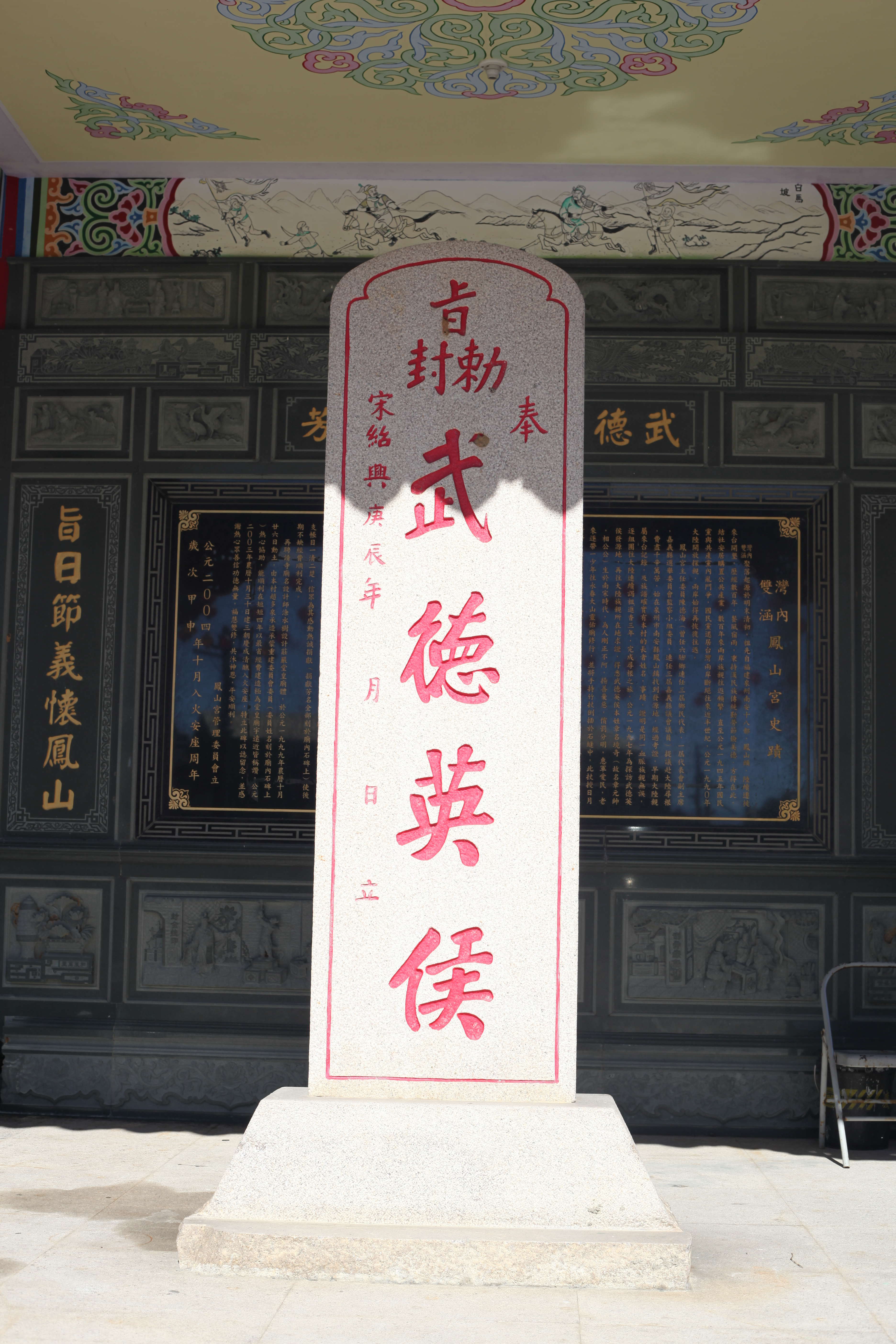 嘉義縣六腳鄉灣北村鳳山宮